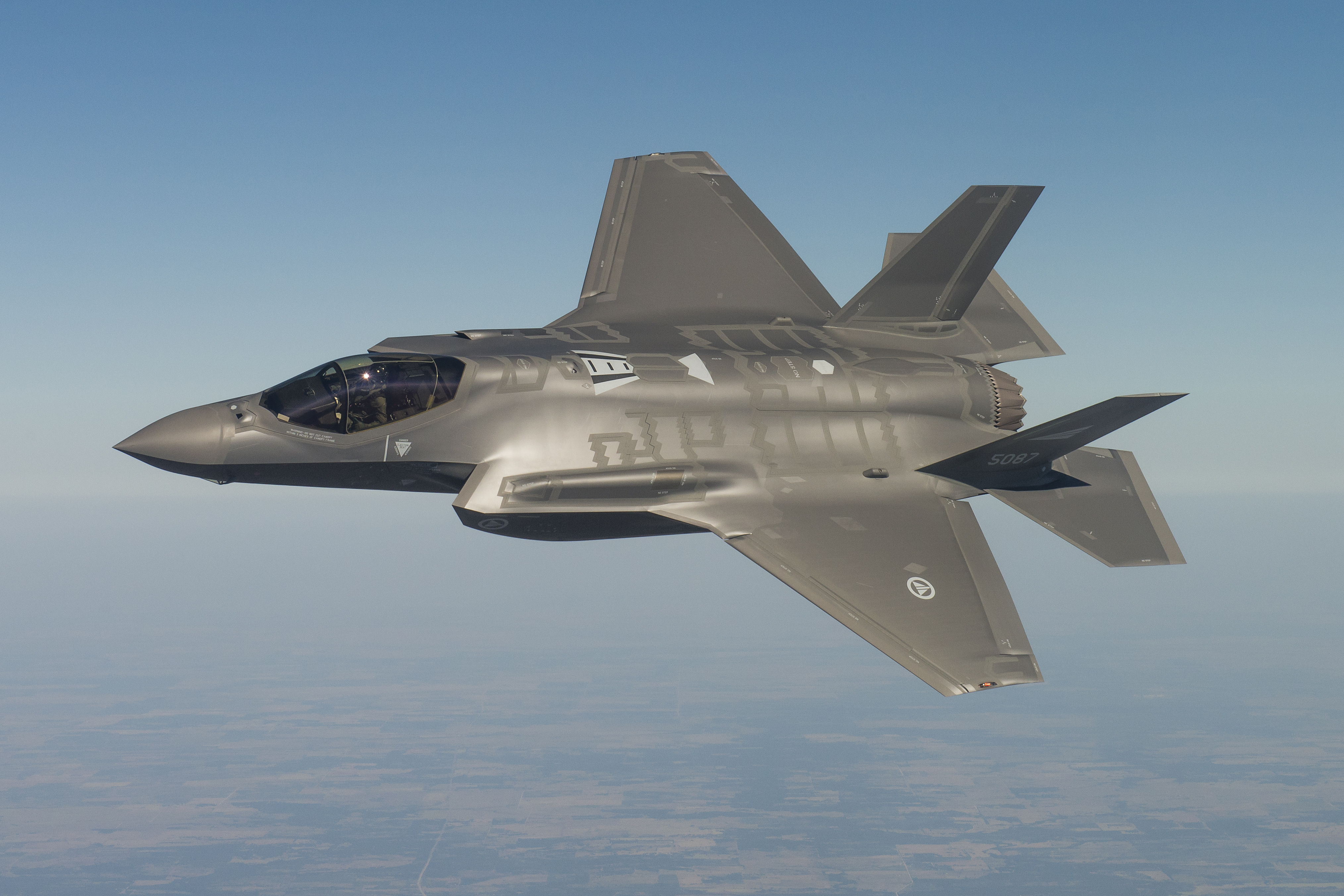 Her tester en flyger fra det amerikanske luftforsvaret Norges første F-35 (AM-1 - 5087) fra Lockheed Martins fabrikk i Fort Worth, Texas, 15. oktober. Bildene tilhører Lockheed Martin, men kan fritt brukes mot kreditering. Fotograf: Kaszynski - Images from a test flight of Norway's first F-35 taken on 15 October 2015. Photo: Kaszynzki, Lockheed Martin.